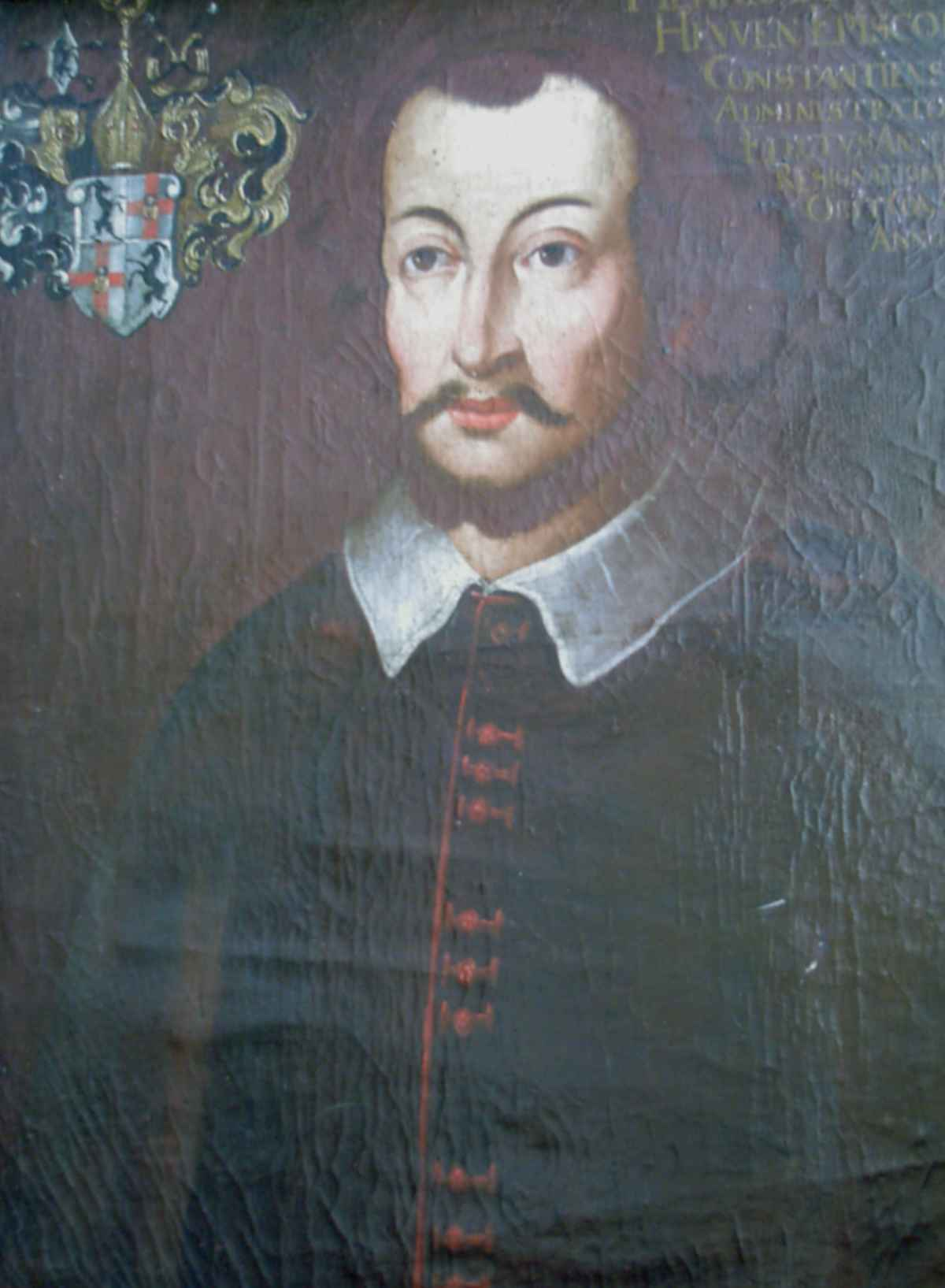 Heinrich von Hewen (* um 1398 † 1462) Fürstbischof von Konstanz 1436-1462, Apostolischer Administrator von Chur 1441-1456